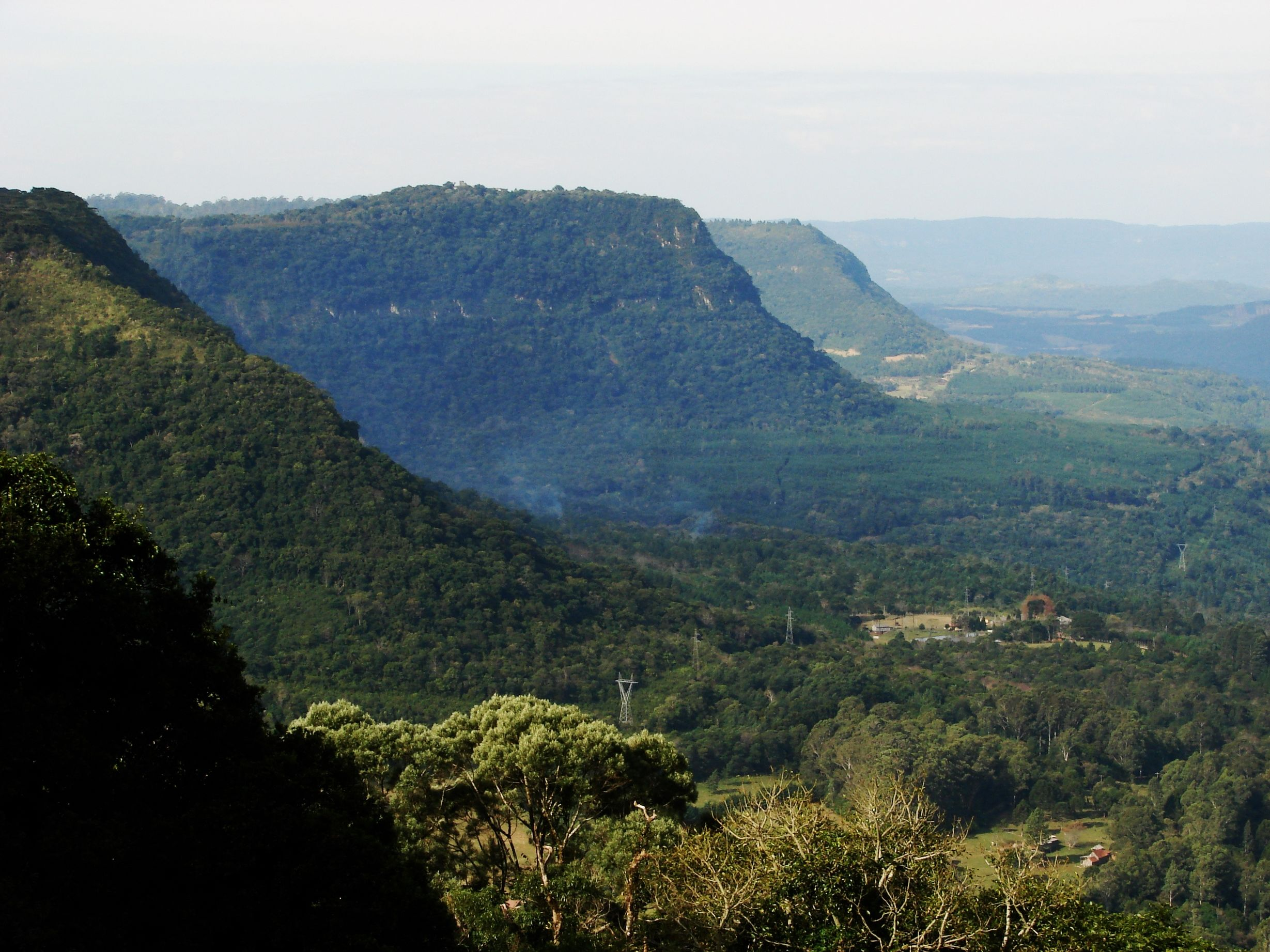 Mirante em Gramado